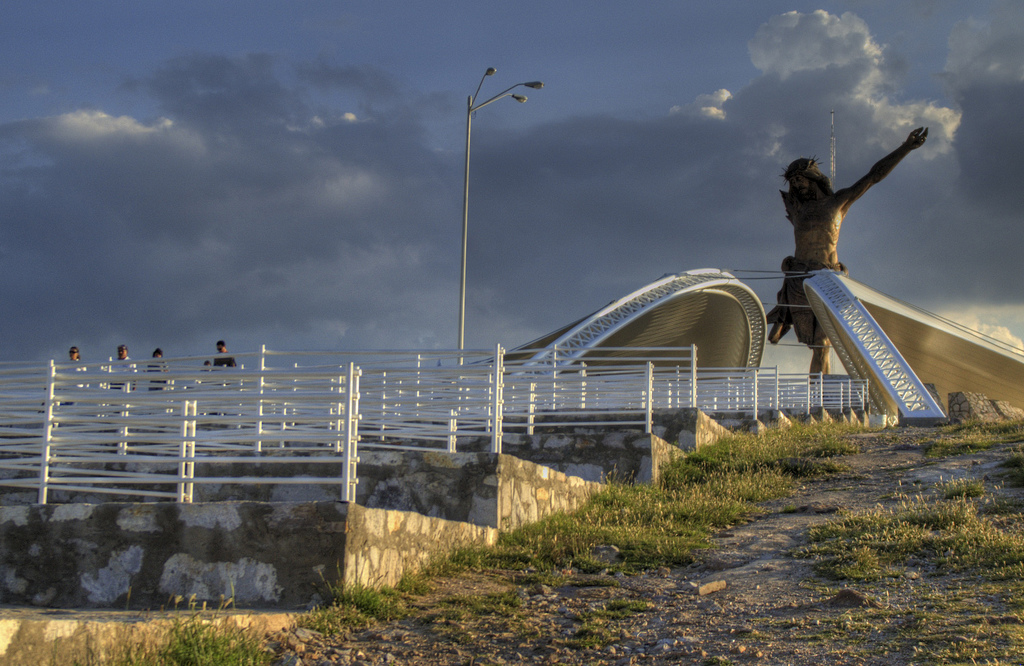 El Santuario del Cristo Roto en Aguascalientes, Mexico